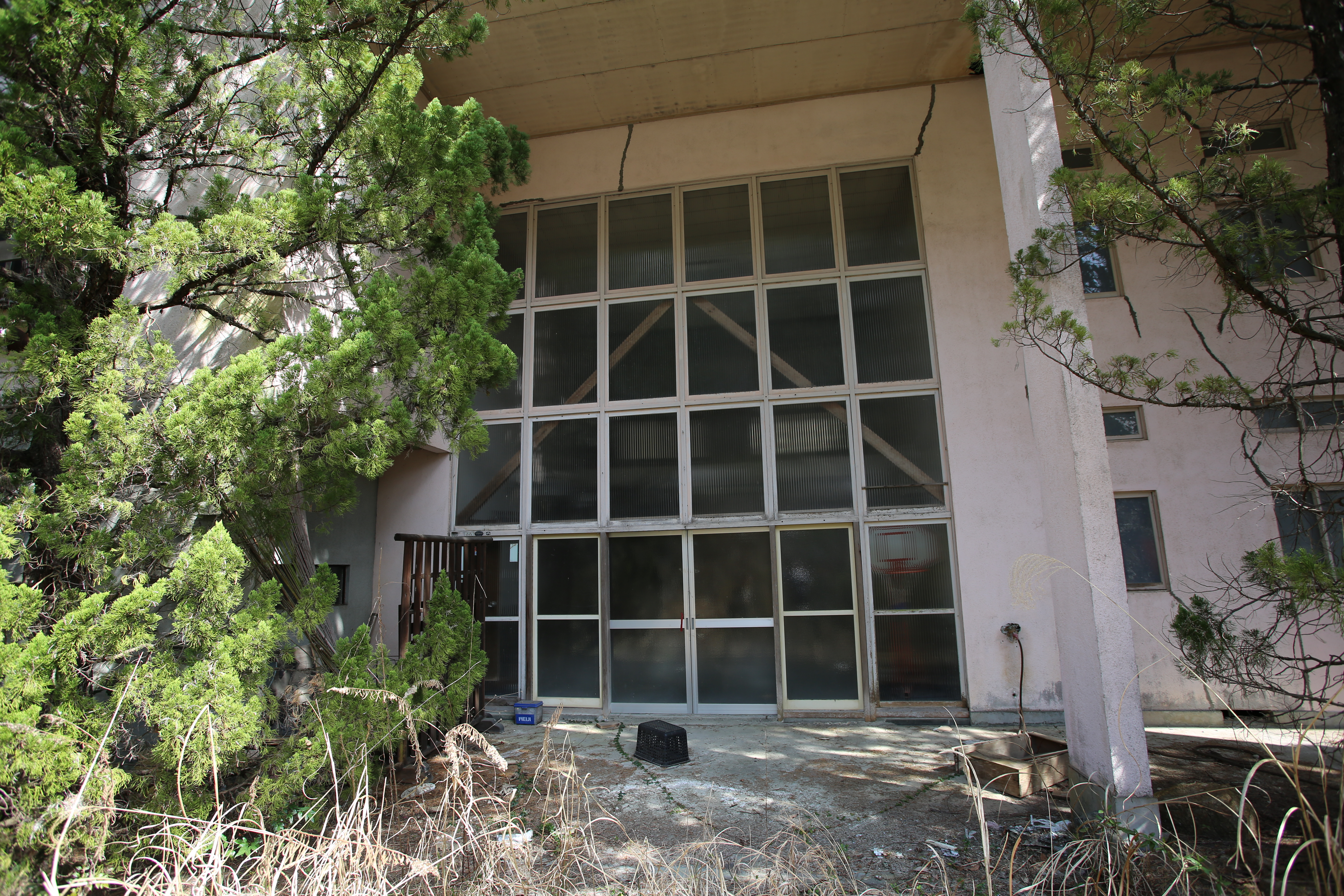 広島県福山市本郷町本郷温泉地区、廃業した旅館。魚清別館。